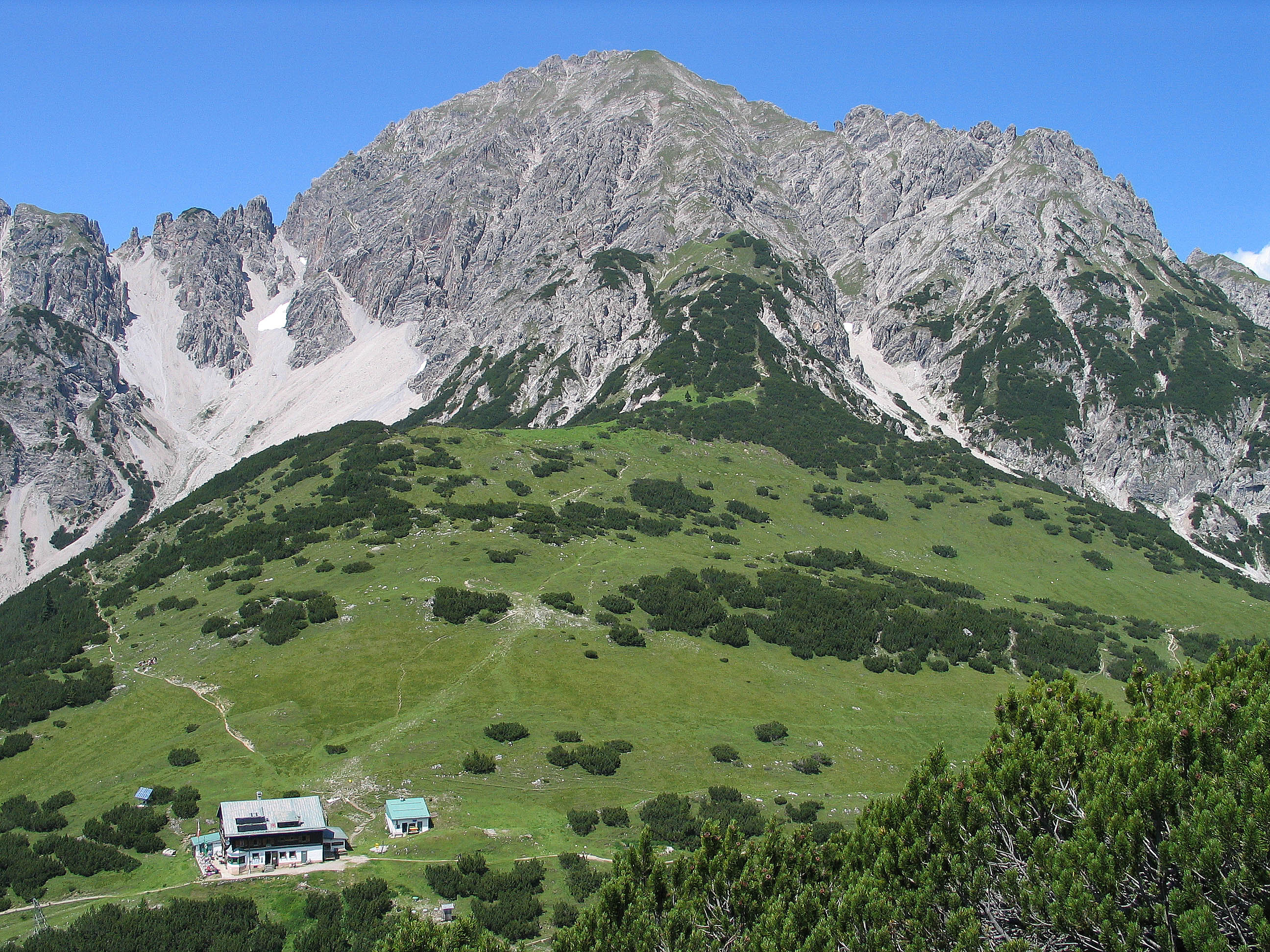 Solsteinhaus, Karwendel Photograph: Luidger (16. Juli 2006)